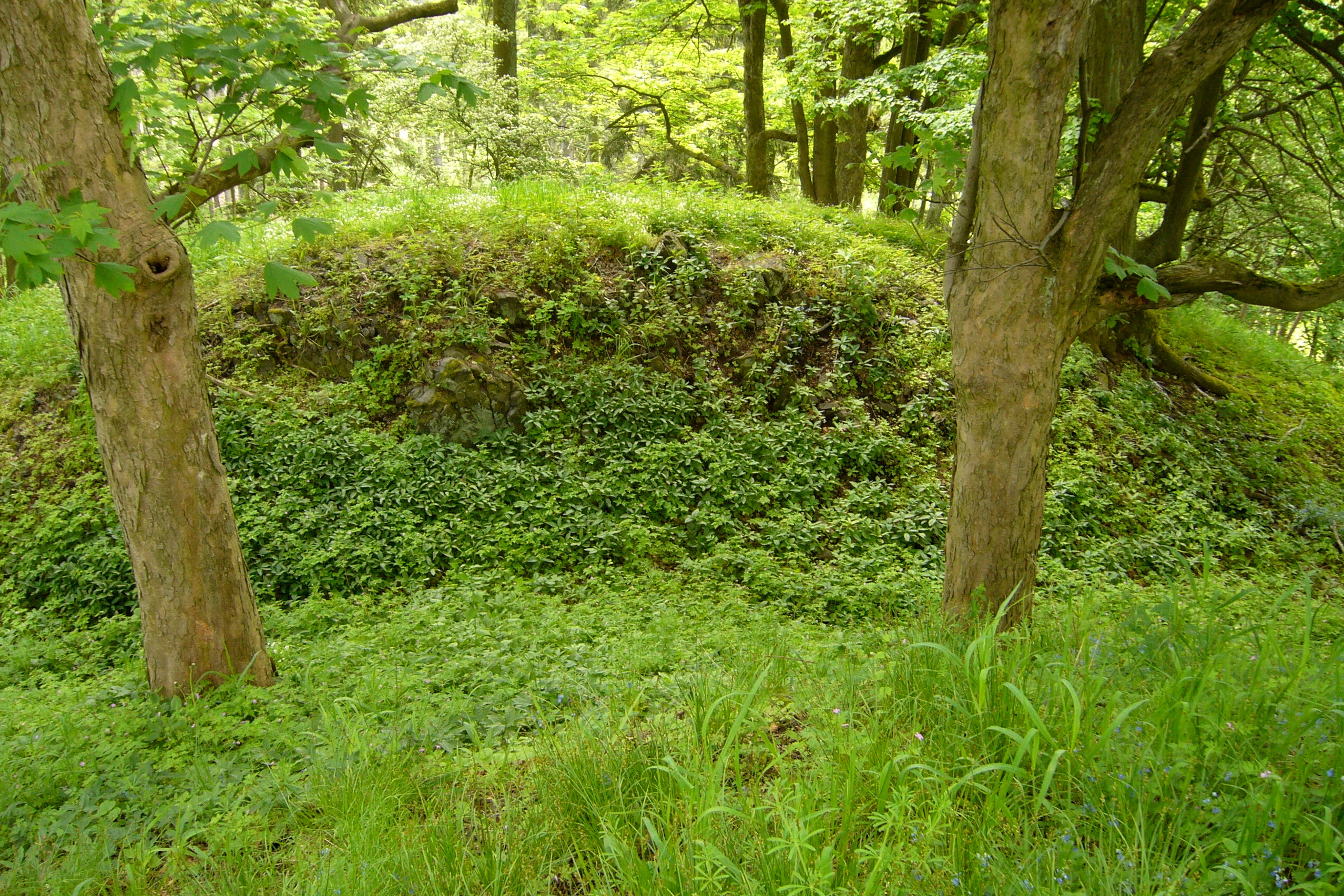 Příkop